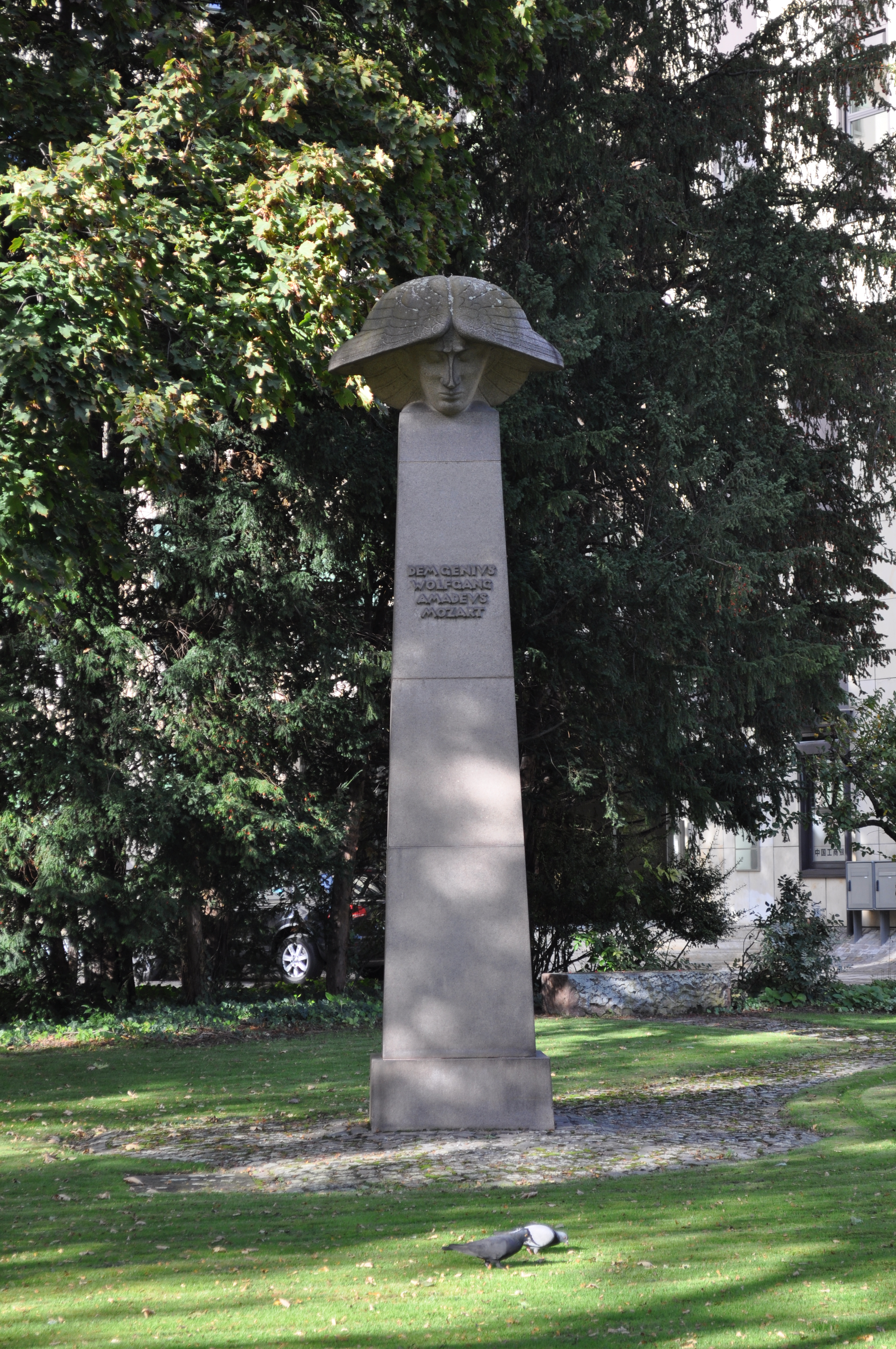 Mozartdenkmal am Mozartplatz in Frankfurt. Das Mozart-Denkmal am Mozartplatz in Frankfurt am Main erinnert an den Komponisten Wolfgang Amadeus Mozart. 1913 wurde von Georg Bäumler nach einem Entwurf von K. Krüger ein Mozart-Denkmal in Frankfurt geschaffen. Es wurde jedoch im Zweiten Weltkrieg vollständig zerstört. Nach dem Krieg wurde ein neues Denkmal geschaffen. Am 11. Mai 1963 wurde auf dem Mozartplatz vor dem Haus Bockenheimer Anlage 15 das neue, von Prof. Gerhard Marcks geschaffene, Mozart-Denkmal eingeweiht. Es besteht aus einer mehr als 4,90 Meter hohen Säule auf der eine Büste, bedeckt mit einem geflügelten Hut, sitzt. Der Hut hat eine Spannbreite von 1,45 m. Verwendet wurde Schwedischer Granit. Das Denkmal trägt die Inschrift „Dem Genius Wolfgang Amadeus Mozart“ (aus Wikipedia Gerhard Marcks).